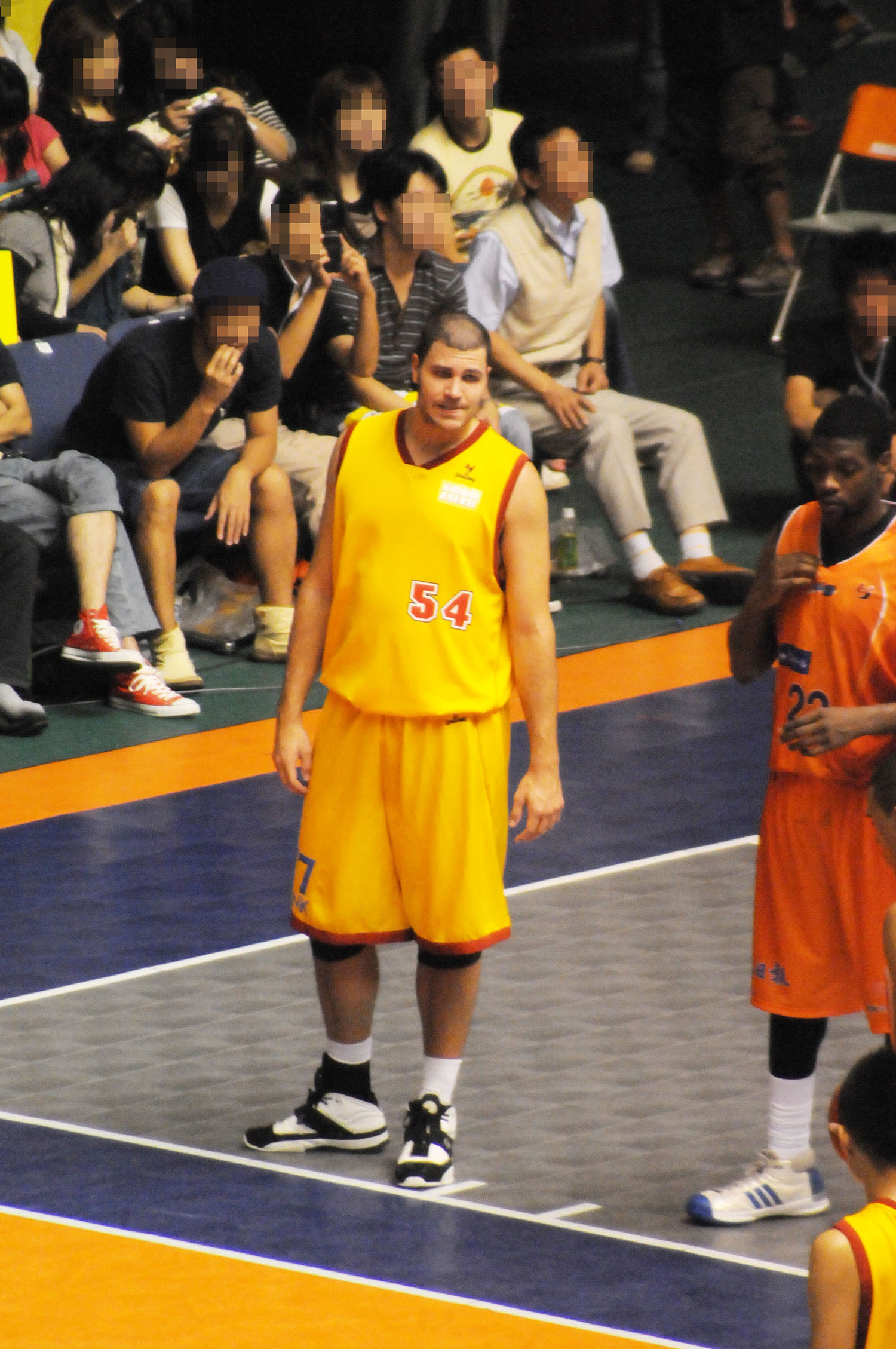 仙台89ERS、クリス・ホルム選手。秋田県立体育館で。